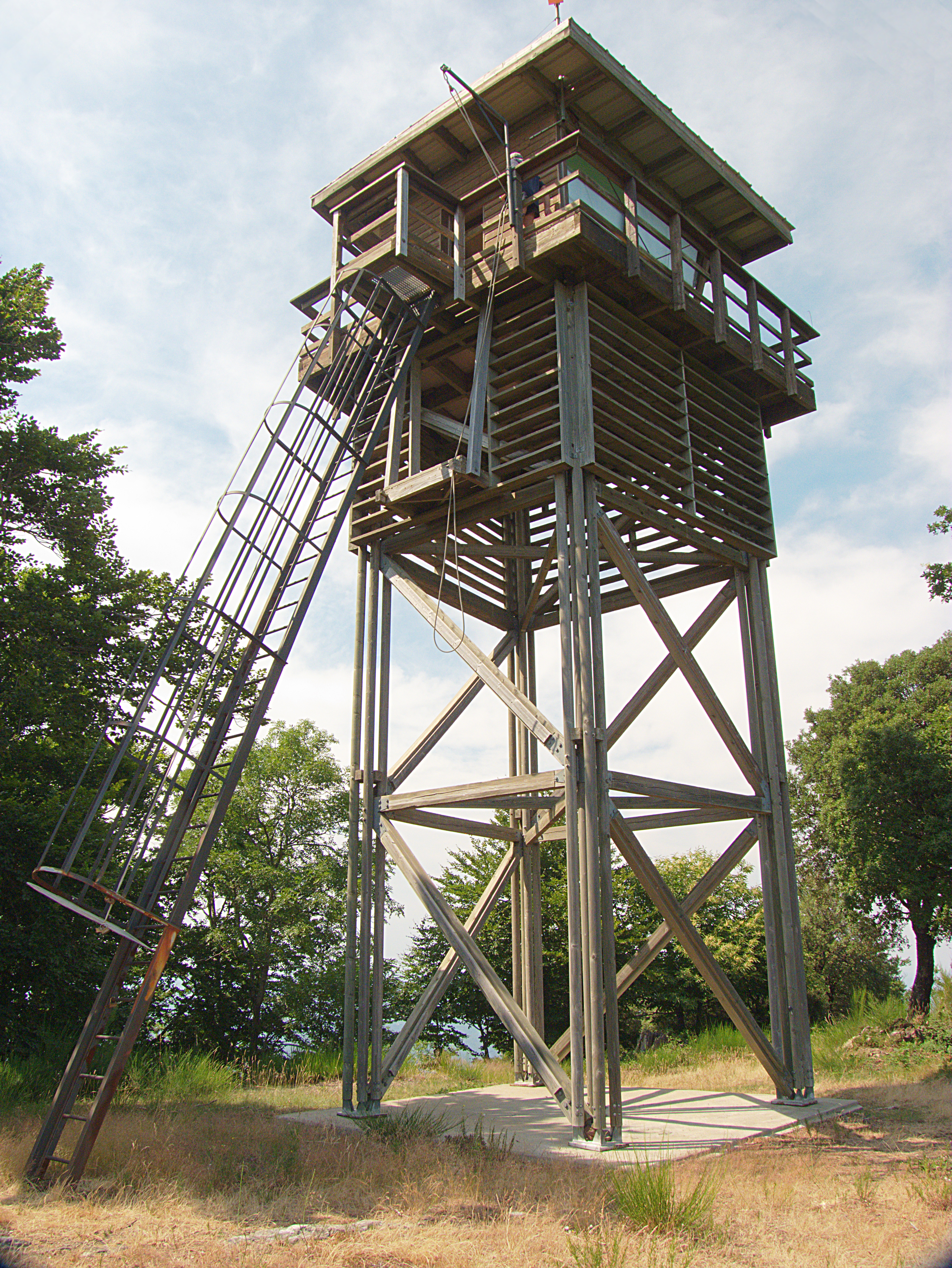 Vigile des feux, Céret (Pyrénées-Orientales, Languedoc-Roussillon, France)